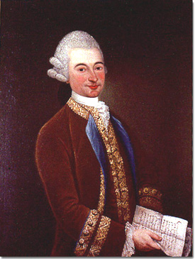 Ritratto del conte Giammbattista Gherardo d’Arco (1739-1791) che regge un foglio ed uno spartito